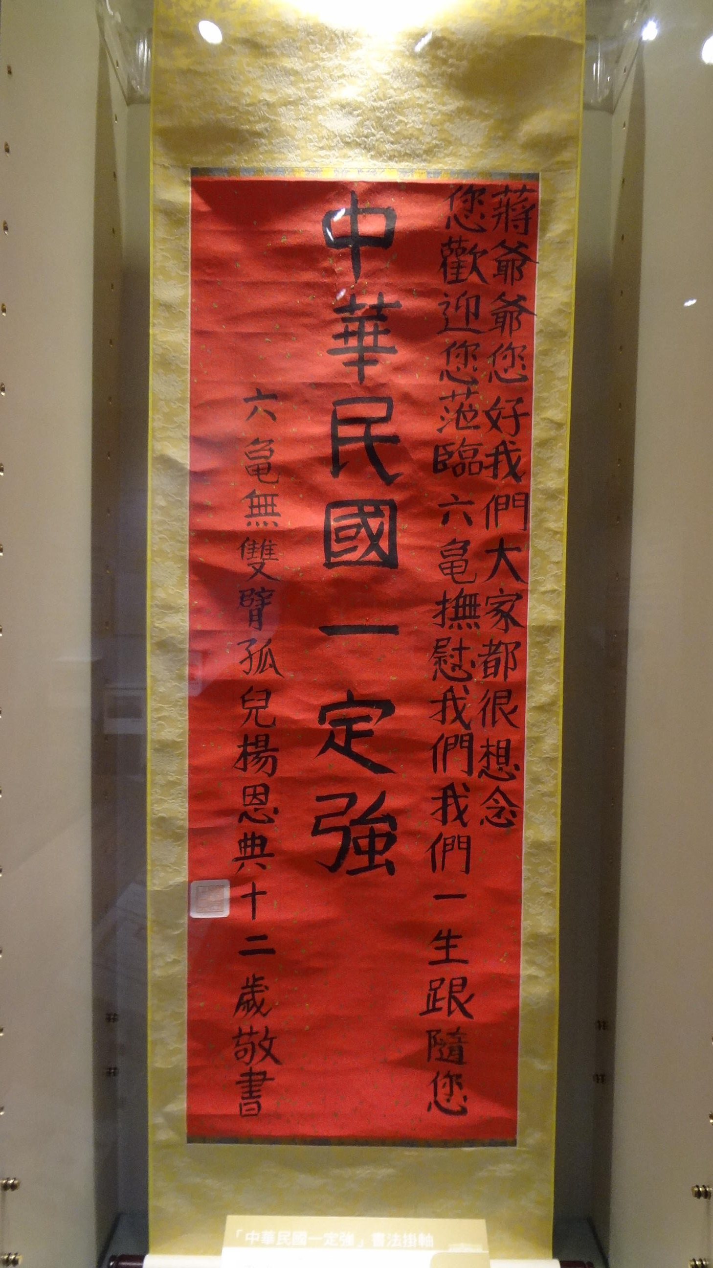 中華民國國史館展示的蔣經國總統文物：楊恩典12歲時寫給蔣經國的「中華民國一定強」書法掛軸。